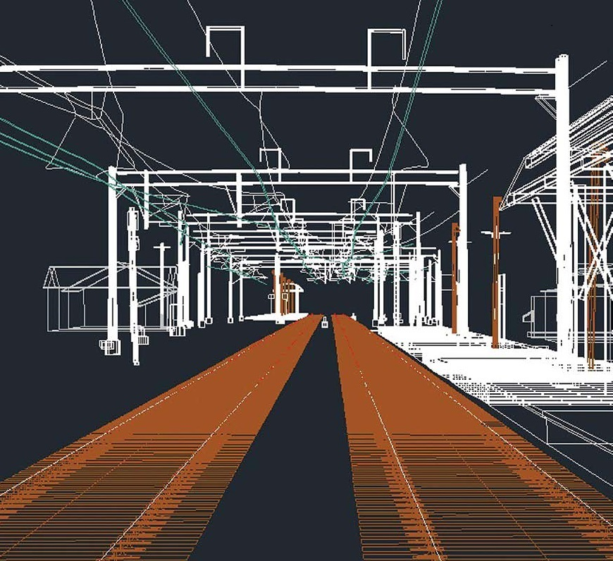 Трехмерная модель участка железной дороги